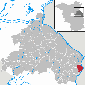 Reitwein in Brandenburg (Country) - District Märkisch-Oderland